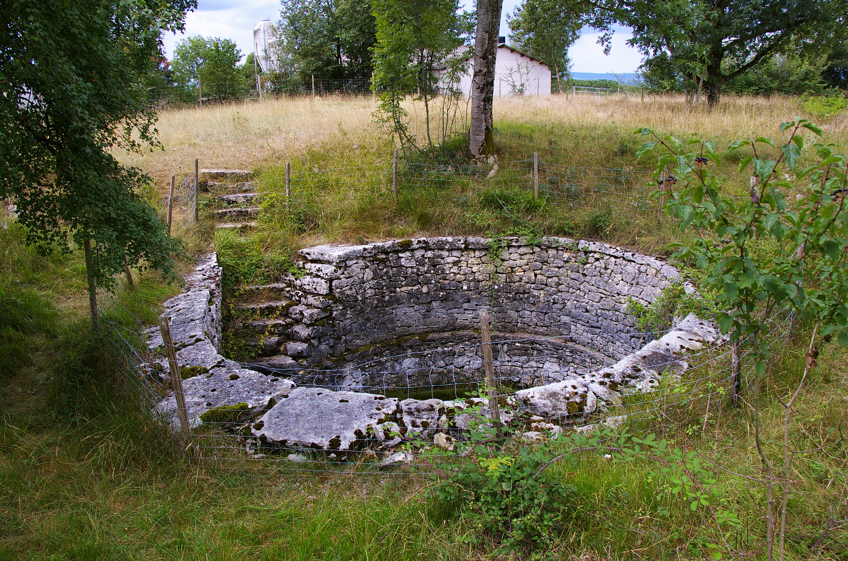 Puits du Mas de la Boute. Puits de grand diamètre avec des marches d'escalier internes permettant d'accéder à l'eau quel que soit son niveau.